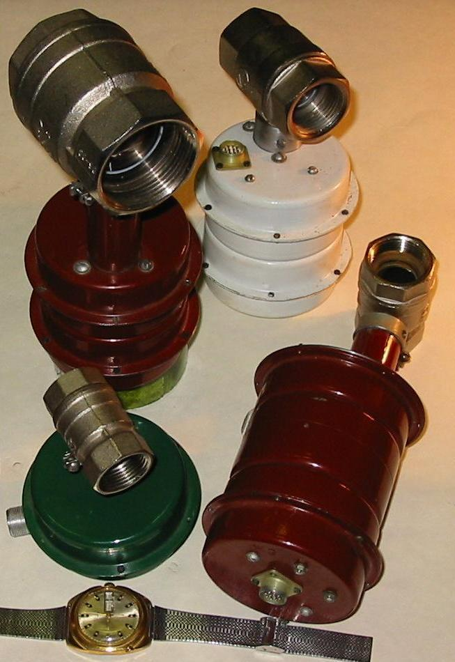 Привід шарового крану на основі п'єзодвигуна